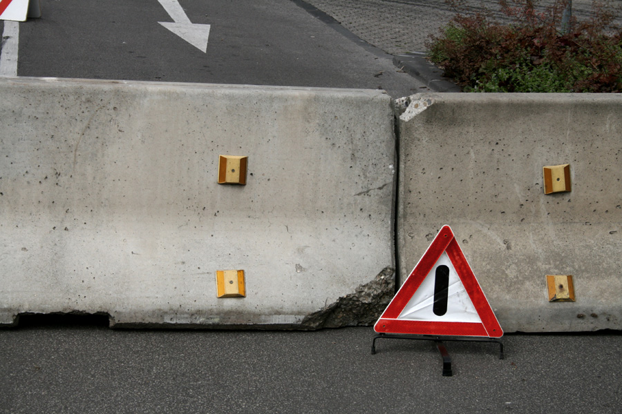 road_block.jpg